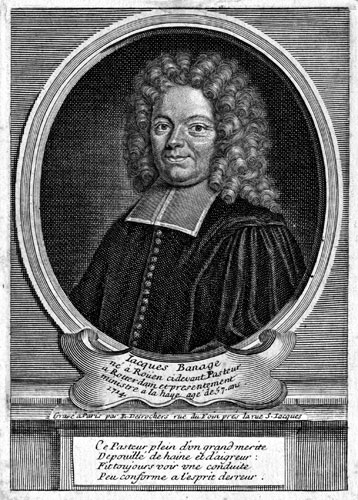 Portrait of Jacques Basnages (1653-1723)